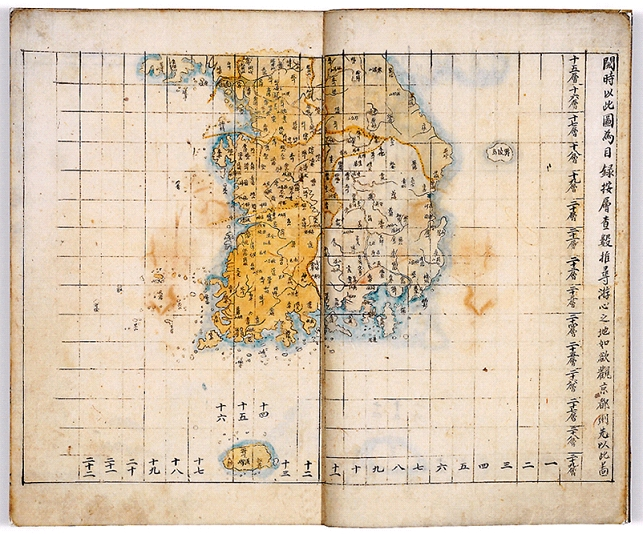 청구도